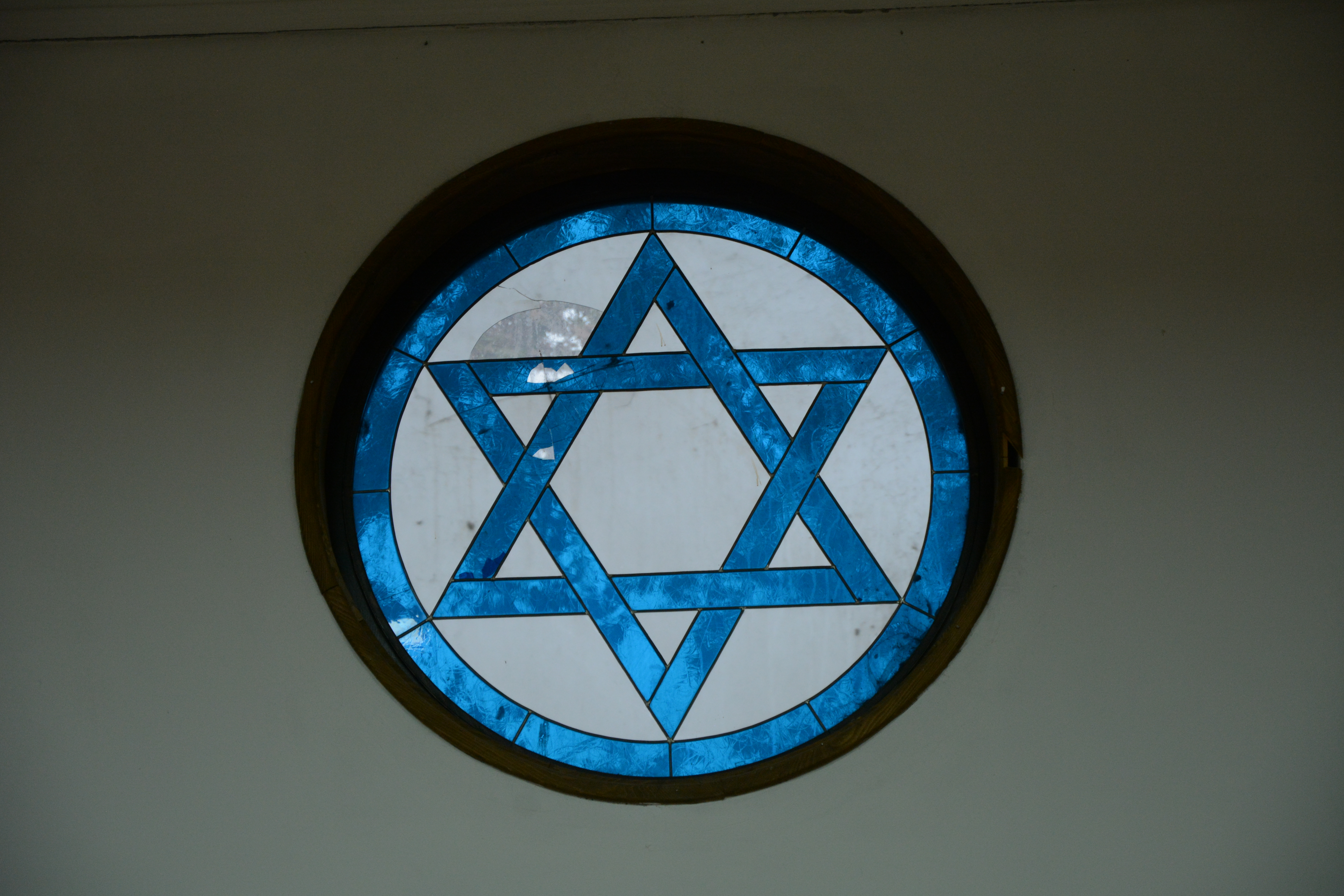 Галерија Синагога - 'Ослобођење Ниша у Другом светском рату и први месеци нове власти'